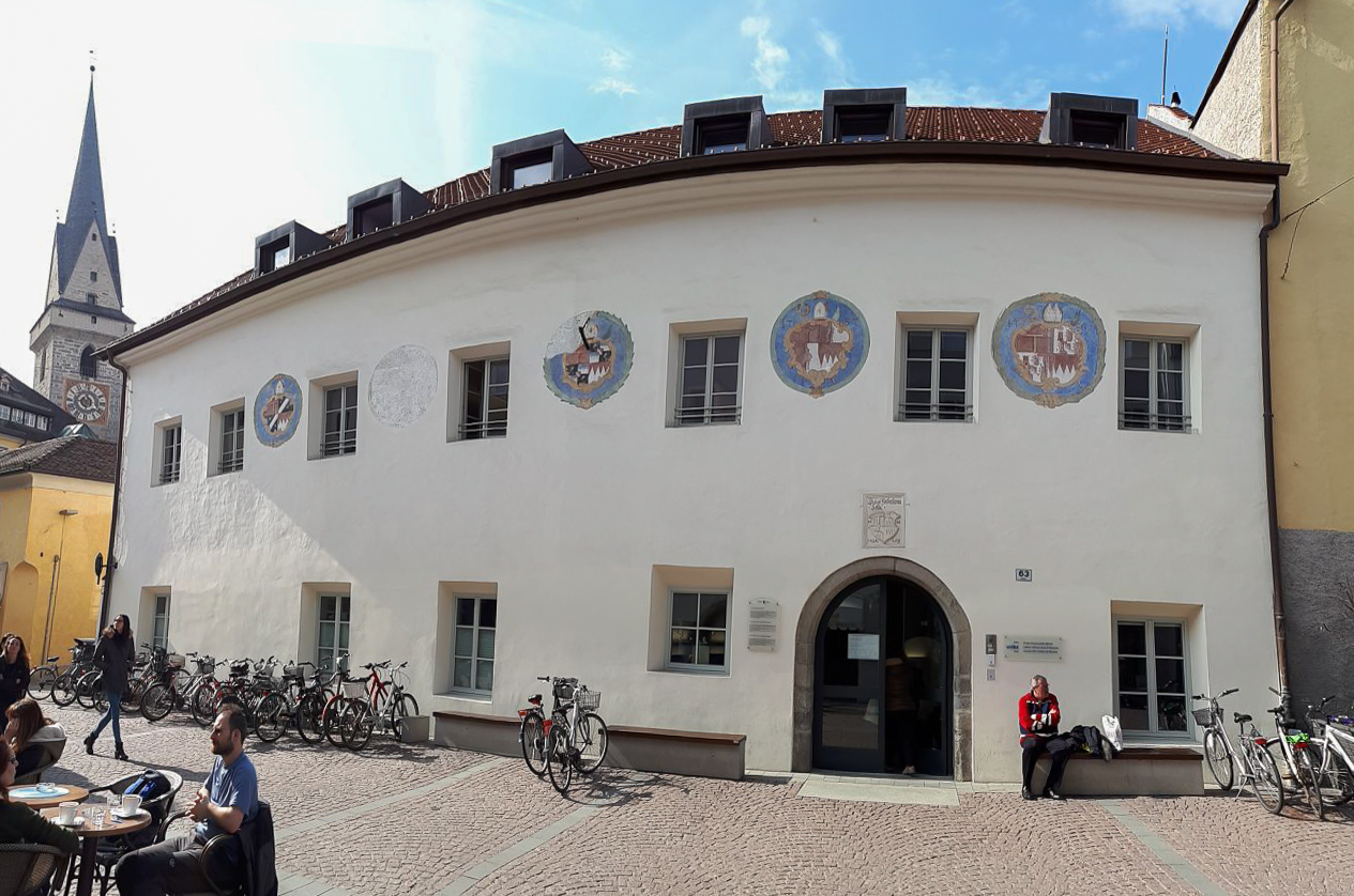 Freie Universität Bozen Standort Bruneck